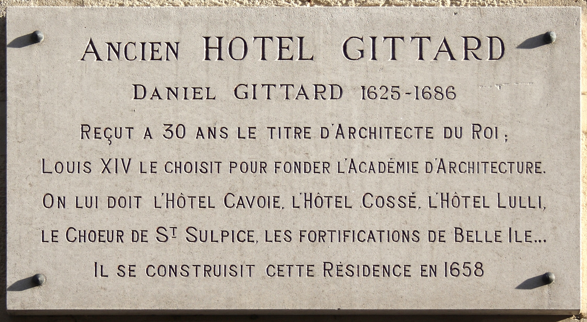 Gedenktafel für Daniel Gittard am Hôtel Gittard in Paris (6. Arrondissement), 65 rue des Saints-Pères